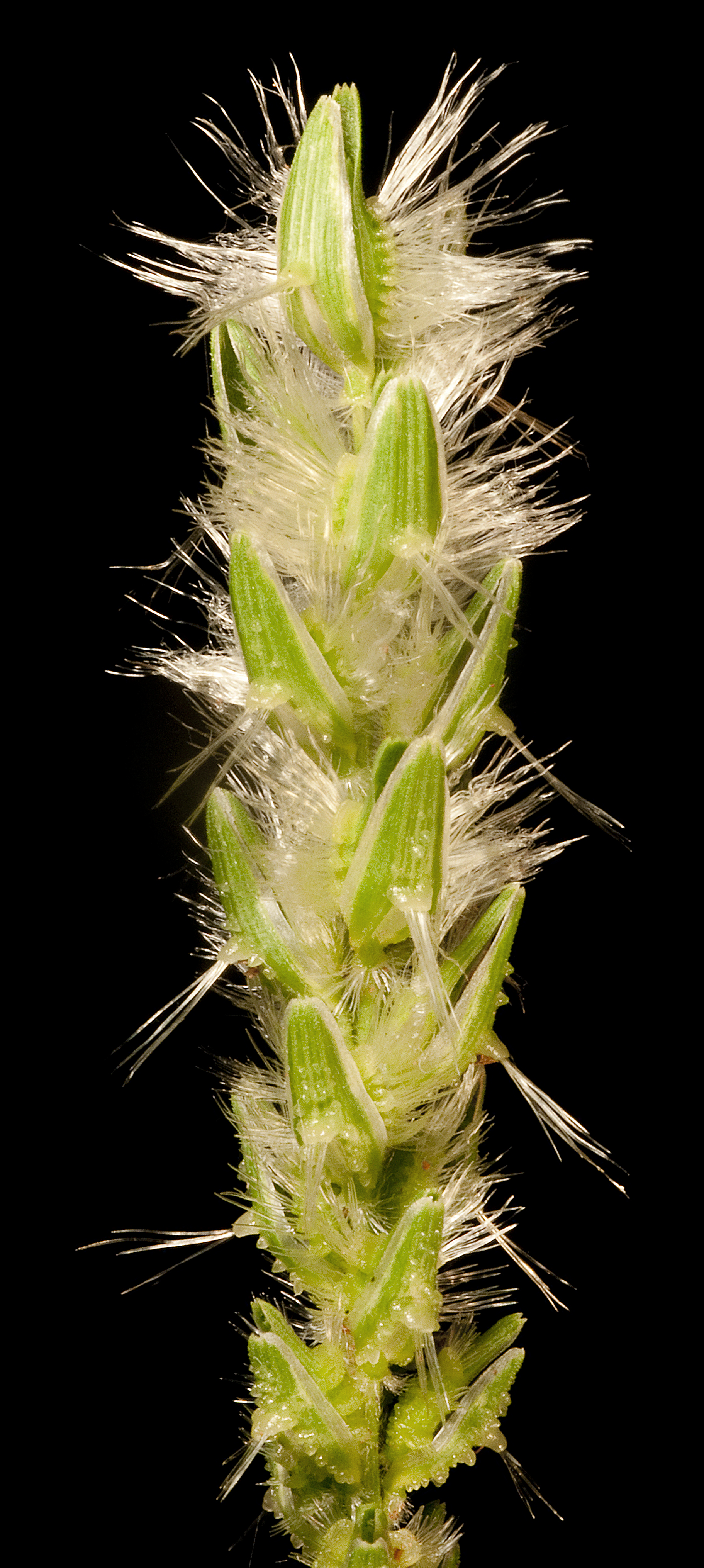 KRT4838